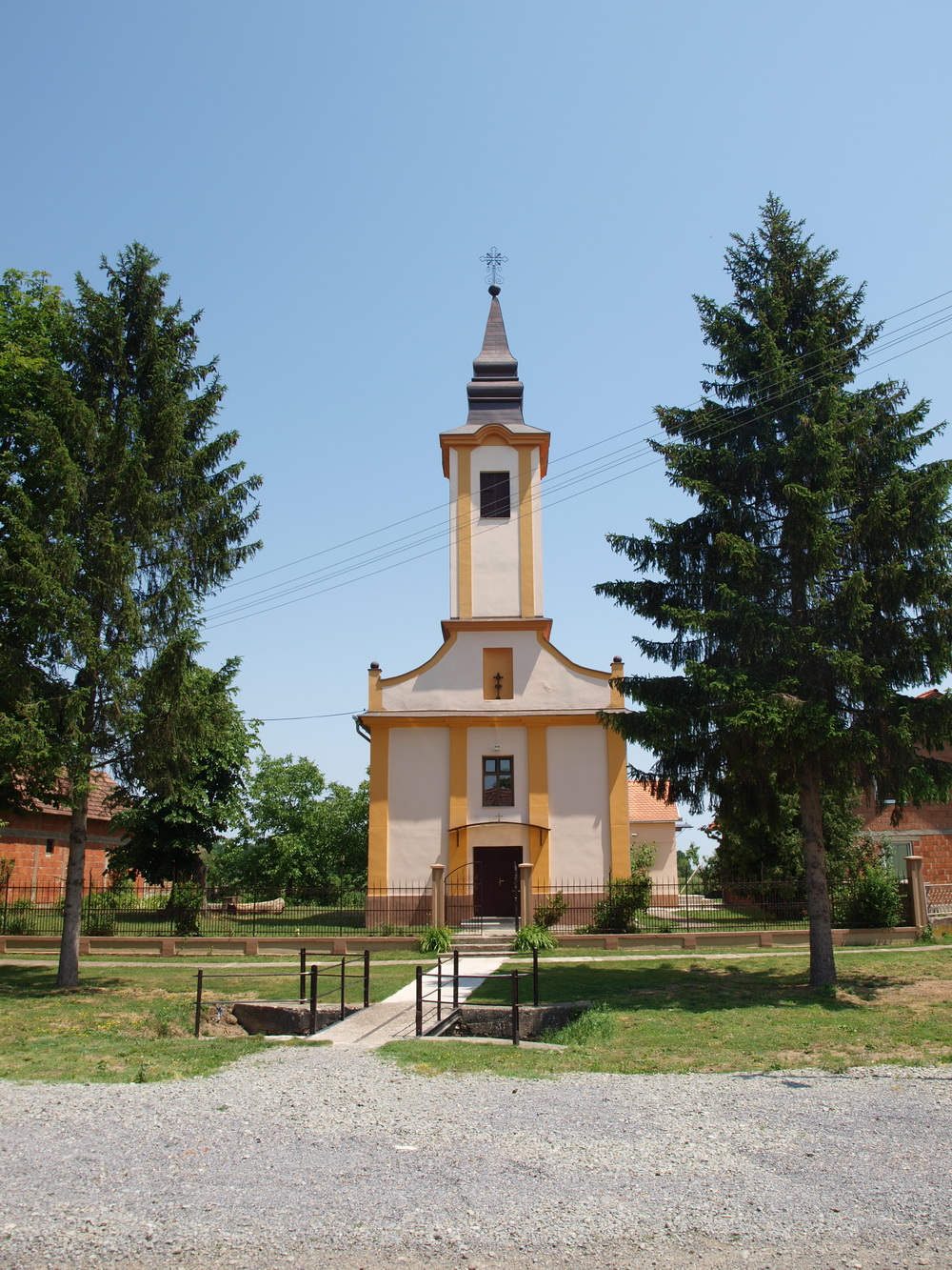 Crkva u Starom Topolju, Brodsko-posavska županija.